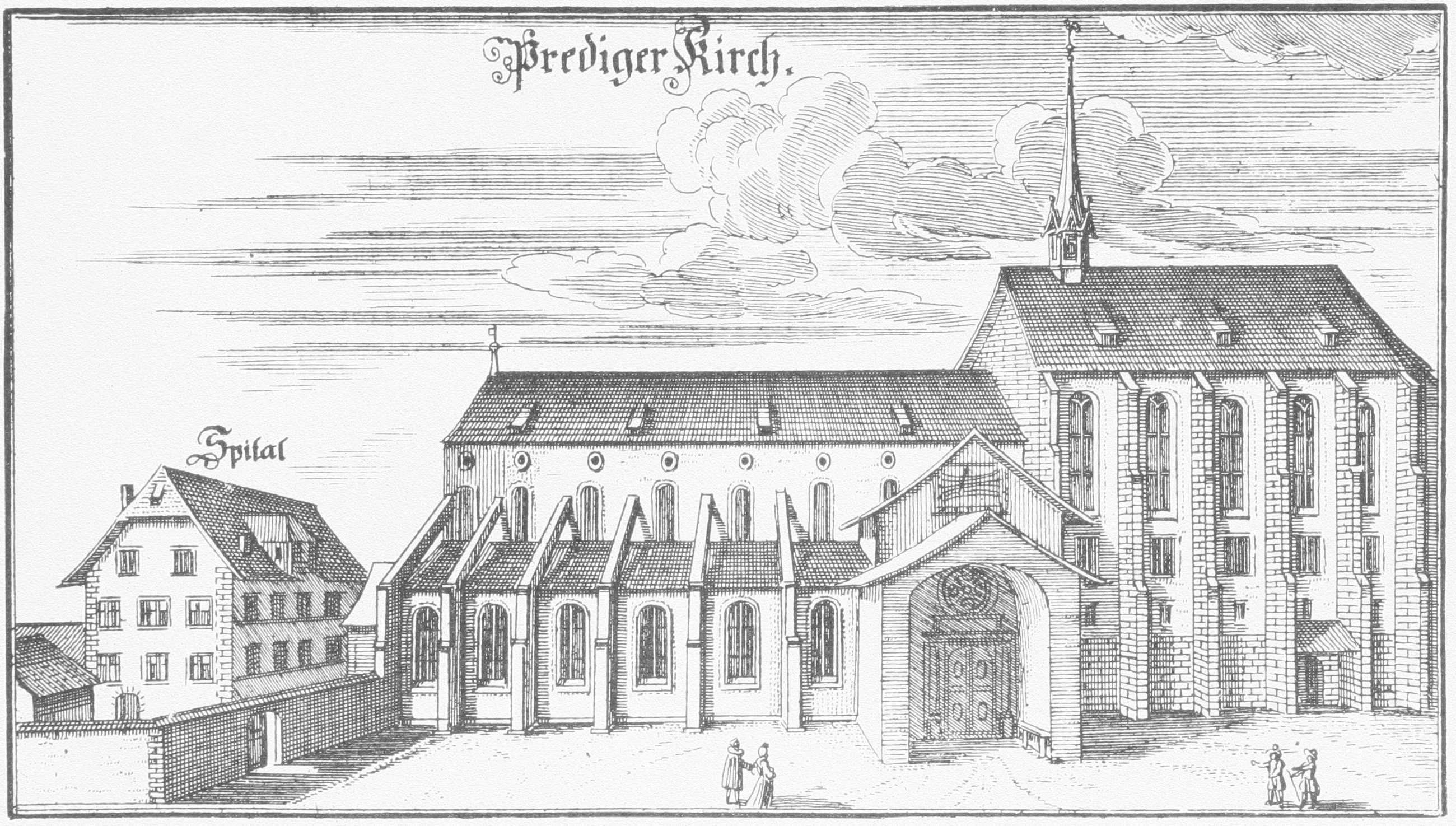 Predigerkirche Zürich, Stich nach Bluntschli, 1742